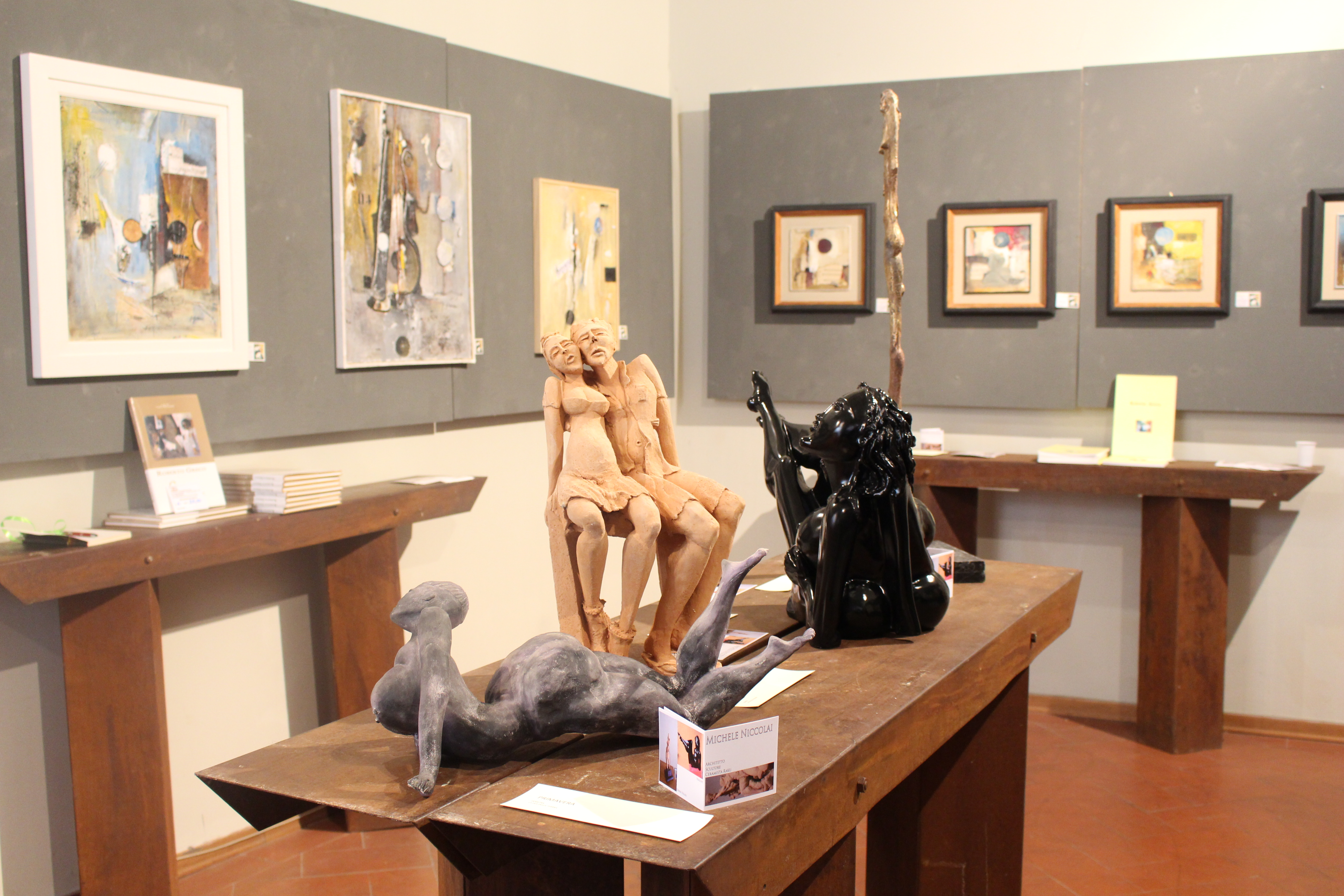 Colle Val d'Elsa le personali di Roberto Greco e Michele Niccolai